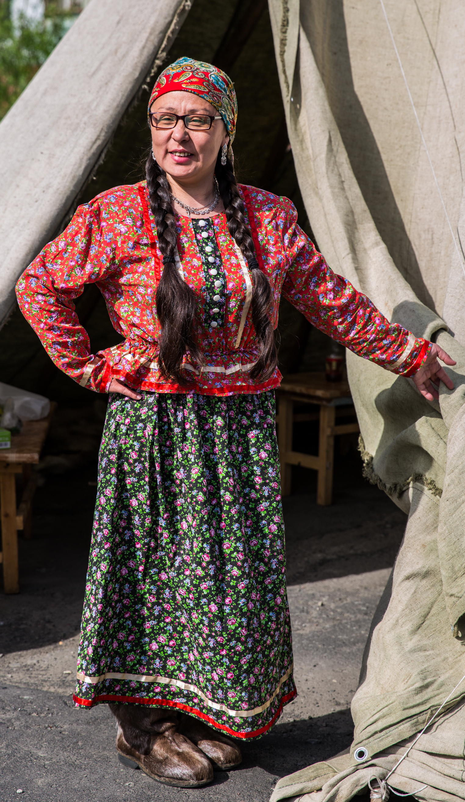 Dudinka, Taymyr Peninsula, Russia A Dolgan woman.